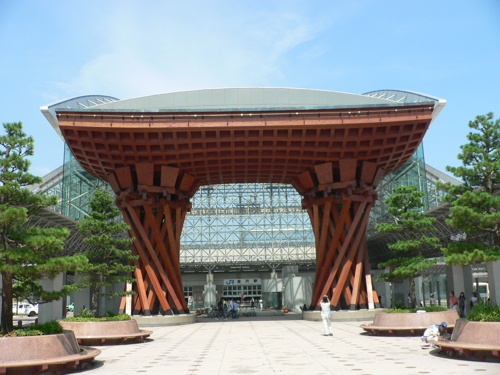 Gare de Kanazawa